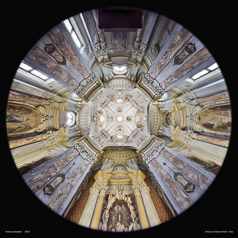 ID:0040292125 vista zenitale della chiesa di Santa Chiara a Bra (CN).